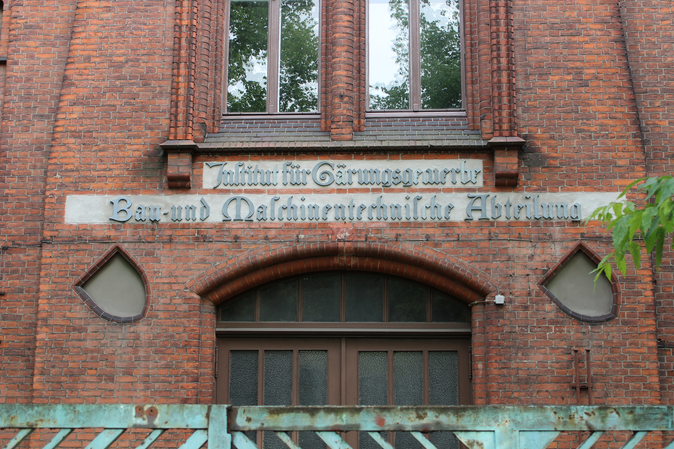 Institut für Gärungsgewerbe Portal an der Seestaße